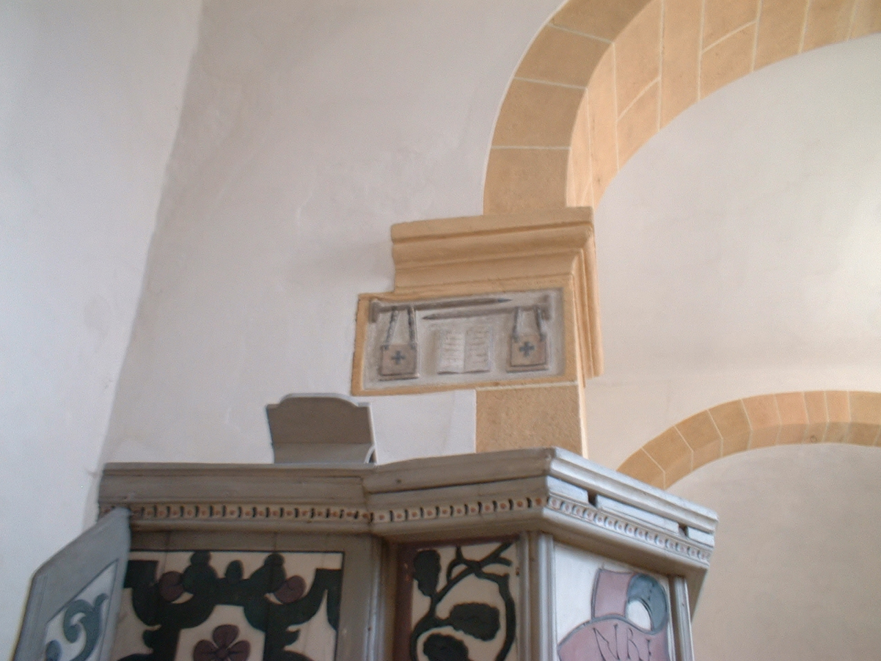 Darstellung der Urim und Tummim in der Martinskapelle Meissen